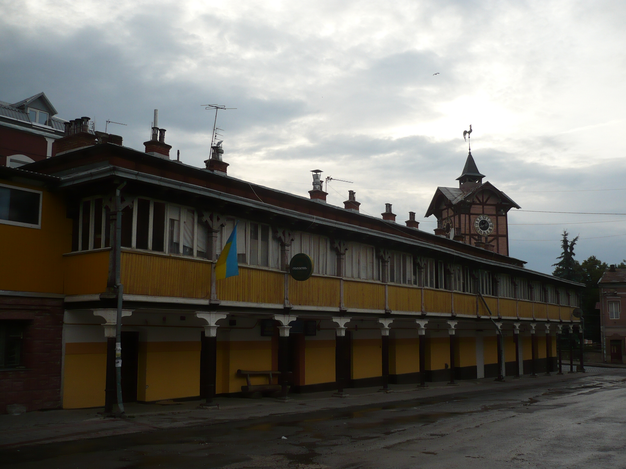 Czortków. Targ